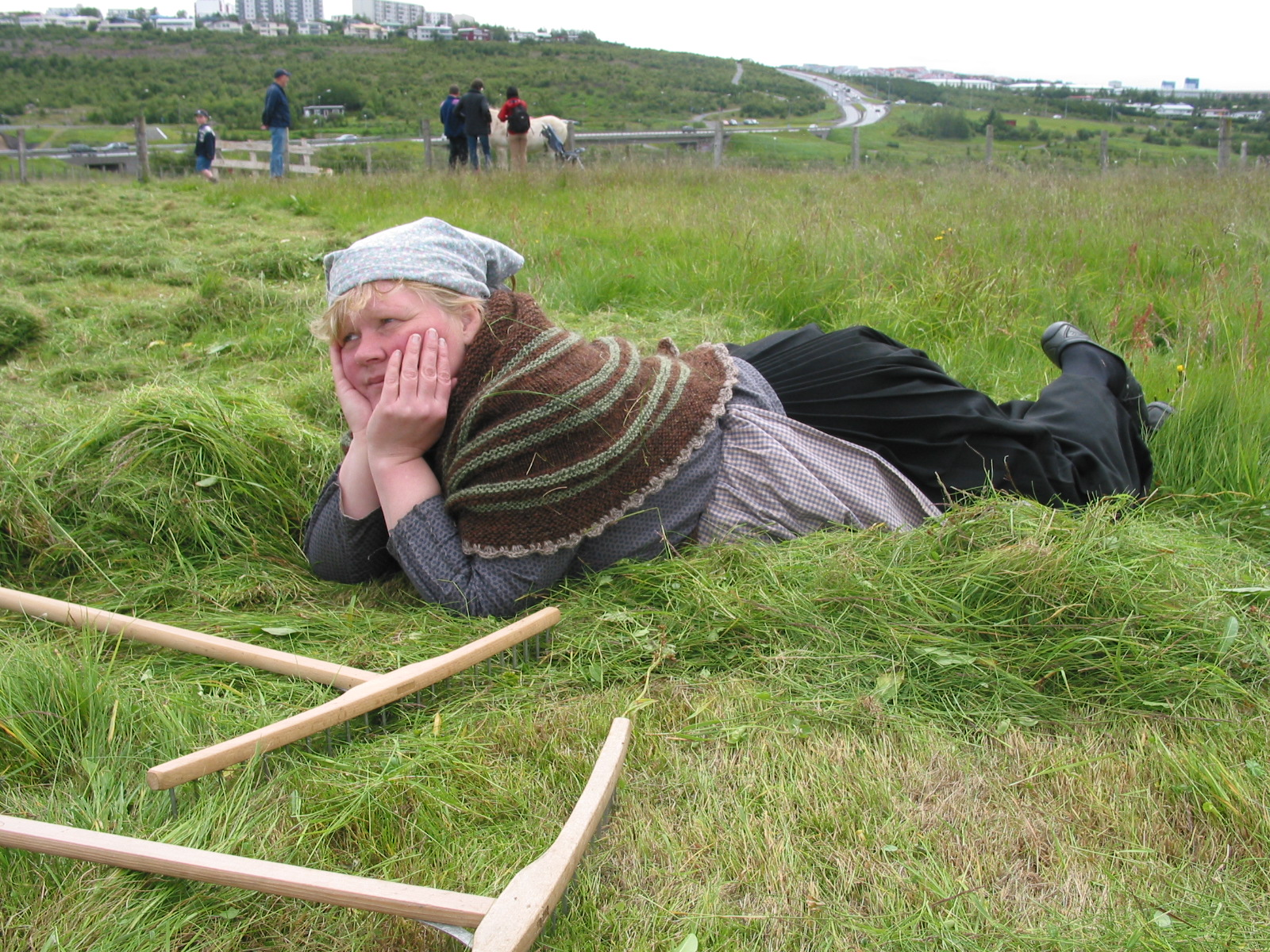 Heymaking at Arbaer Museum 2006